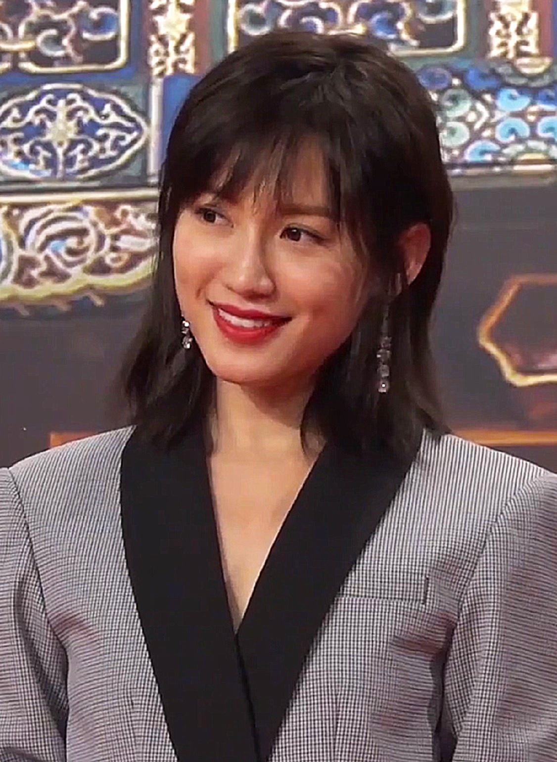 中文（香港）: 2008年出道成為演員，代表作品如《美人心計》、《生死大營救》、《延禧攻略》等